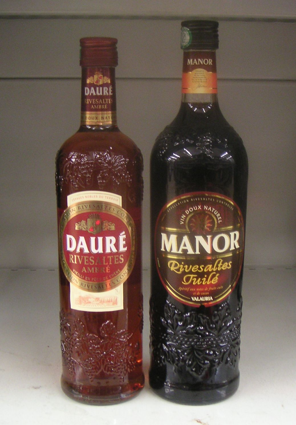 Dos exemples de vi de Ribesaltes. El de la dreta és el conegut com "ambré", i es pot observar que és de color més clar que el de l'esquerra, que és del tipus "tuilé". Son vins de denominacio d'origen "Ribesaltes", a la Catalunya Nord.